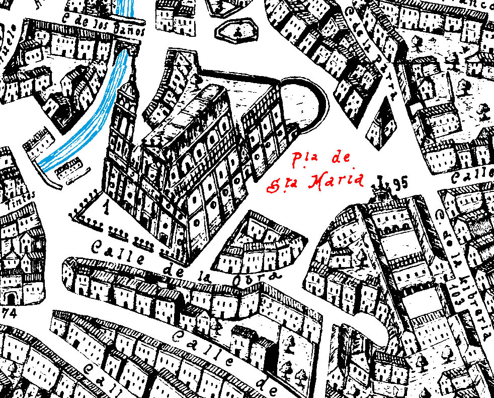 Información parcial del plano de Ventura Seco (1738). Plaza de Santa María, actual Plaza de la Universidad.